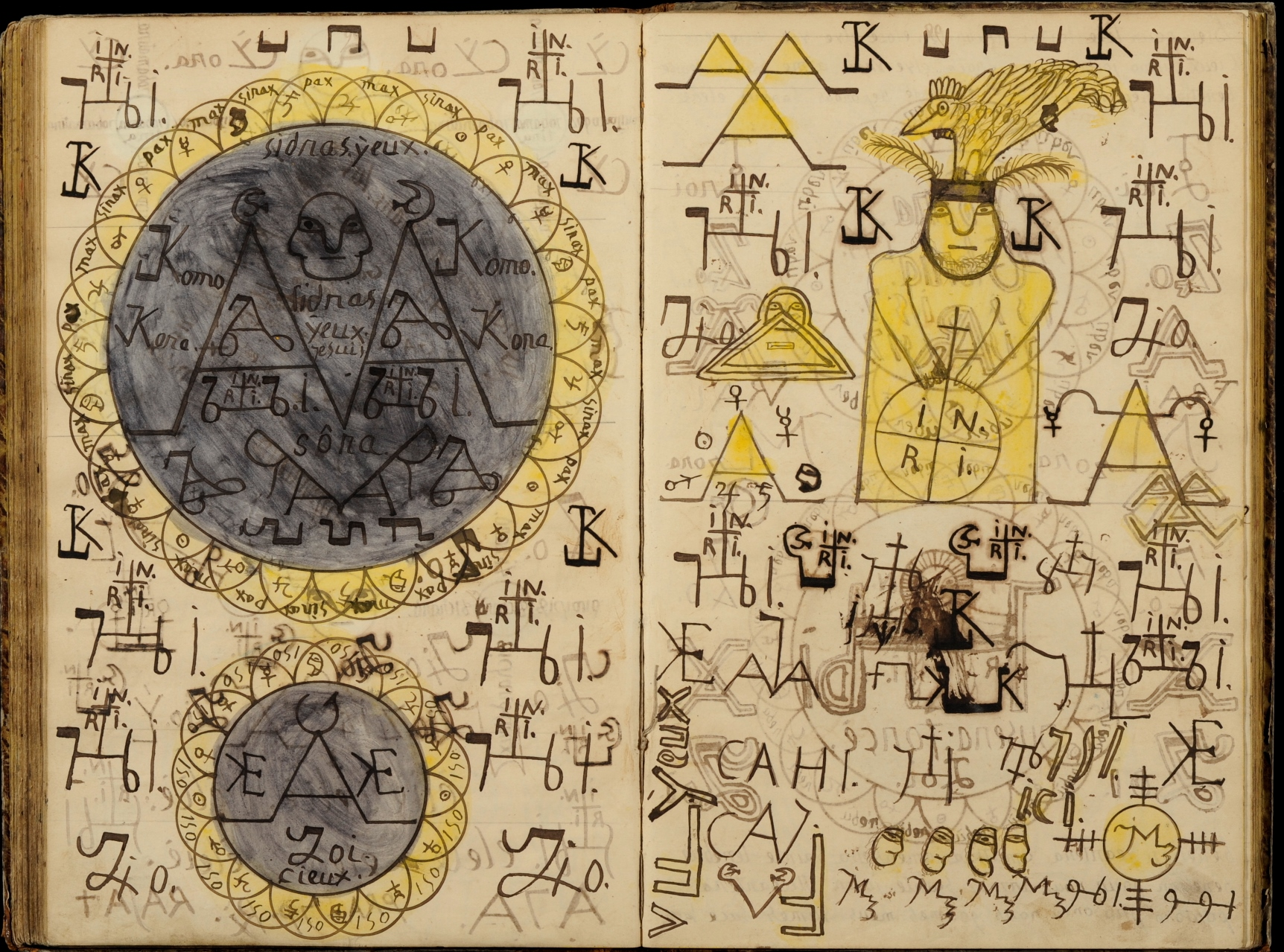 Pierre Richard Double page de l'album 2